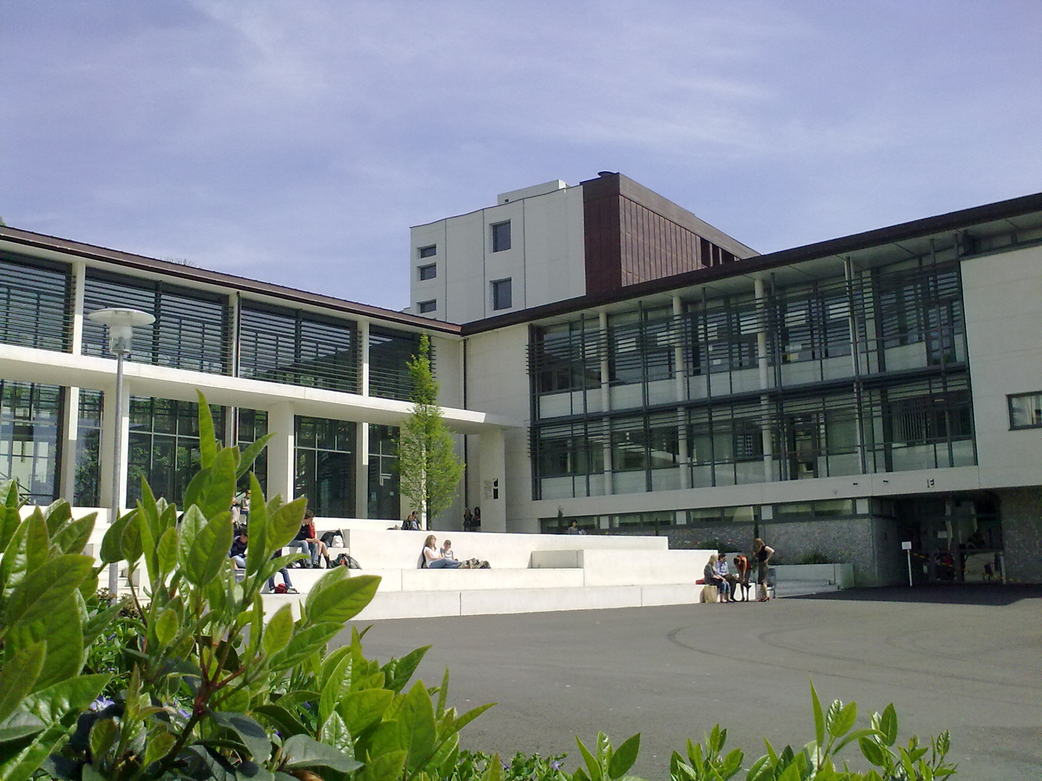 Vue du lycée Jeanne d'Arc de Rouen, France.